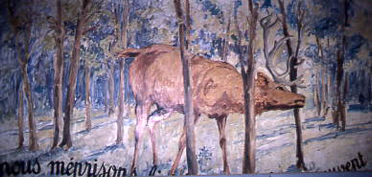 Illustration de la fable de Jean de La Fontaine: Le cerf se voyant dans l'eau Livre VI fable IX.